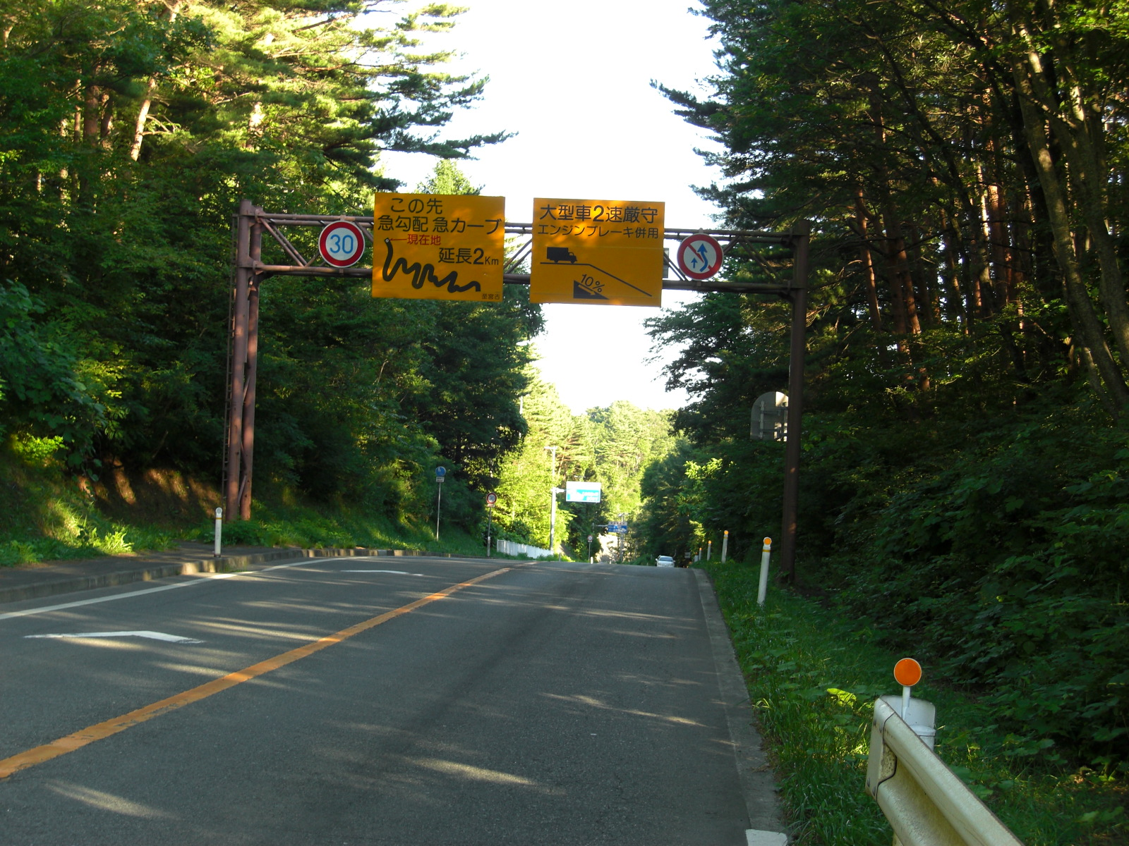 中野坂頂上付近 （仙台方面を望む）